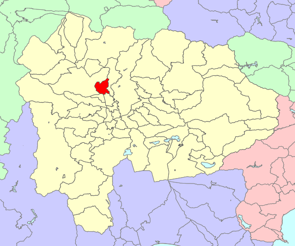 山梨県北巨摩郡双葉町の位置画像。